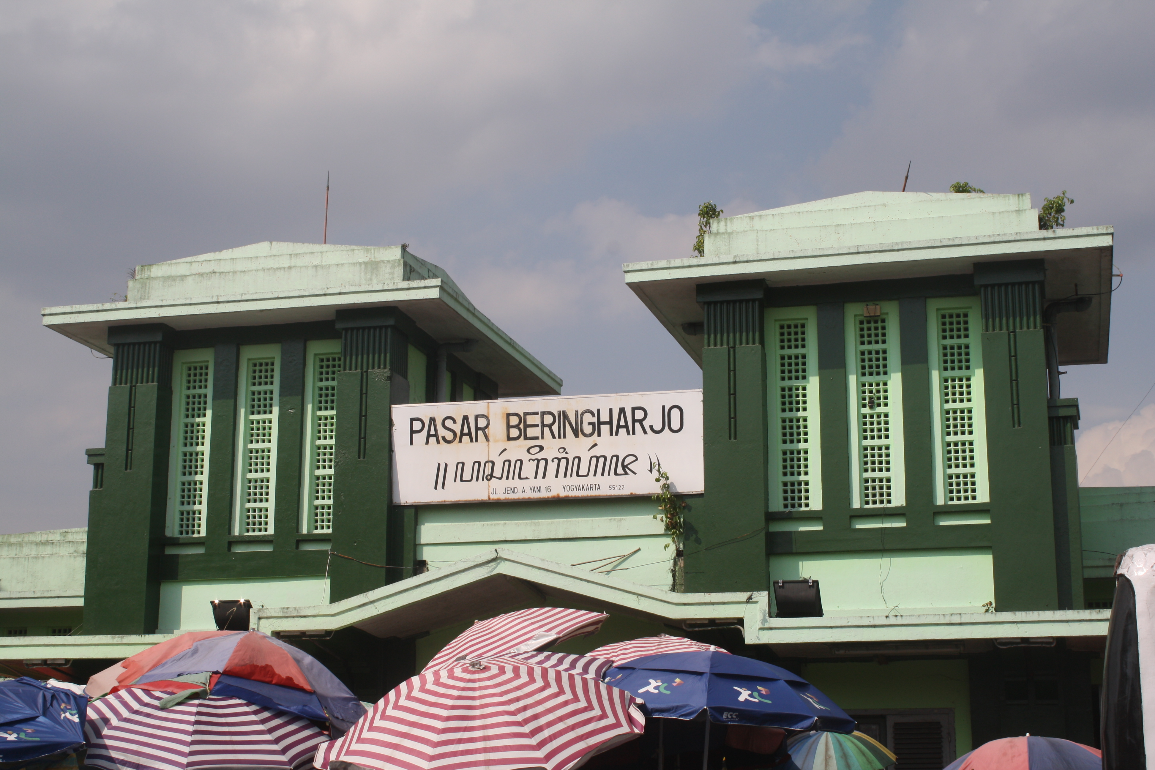 Pasar Beringharjo yang terdapat dikawasan malioboro Yogyakarta Jawa Tengah Indonesia